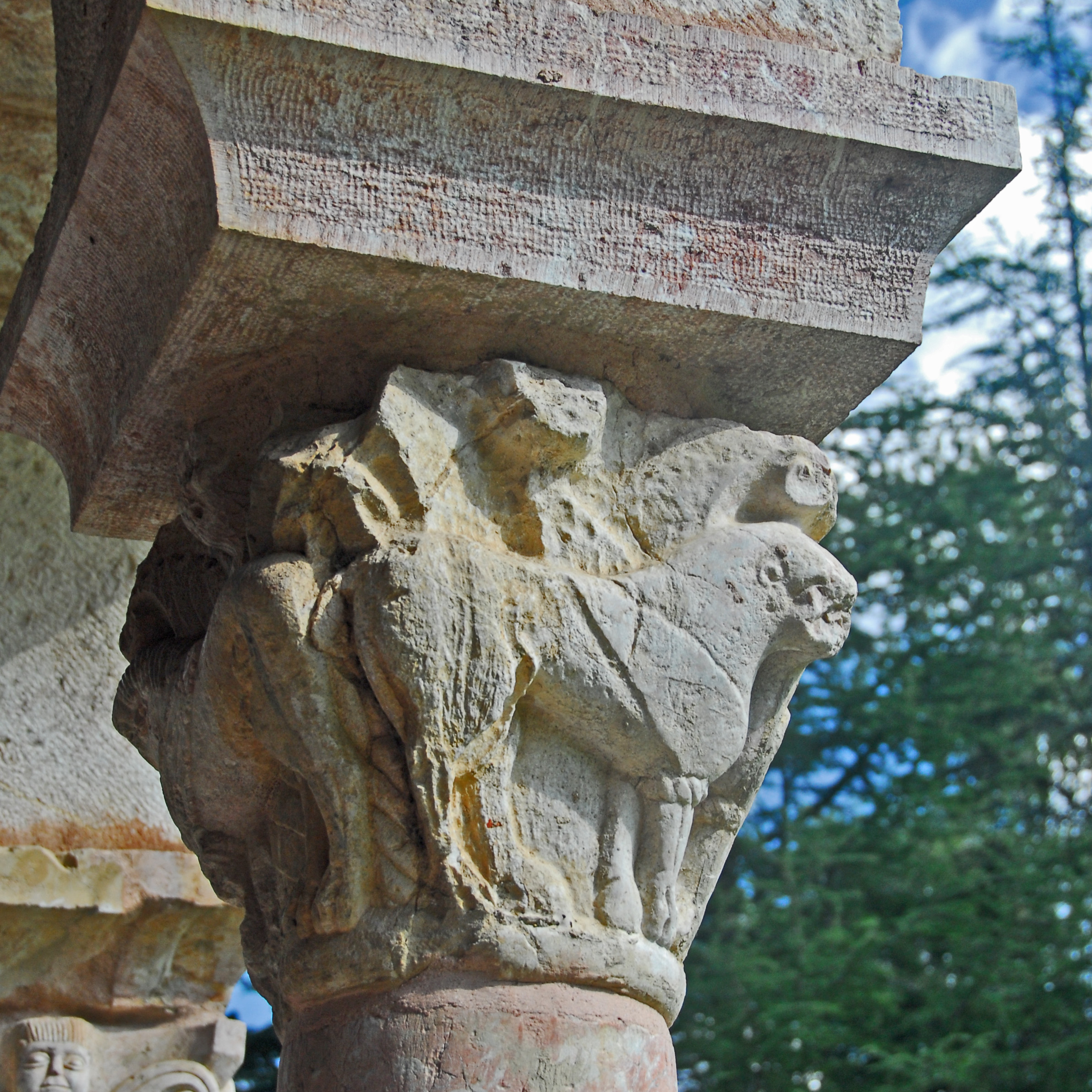 Abbaye Michel-de-Cuxa, Kapitell, Löwen, seitlich stehend